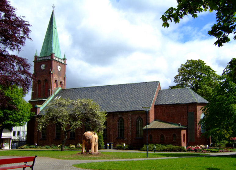 Sandnes Church